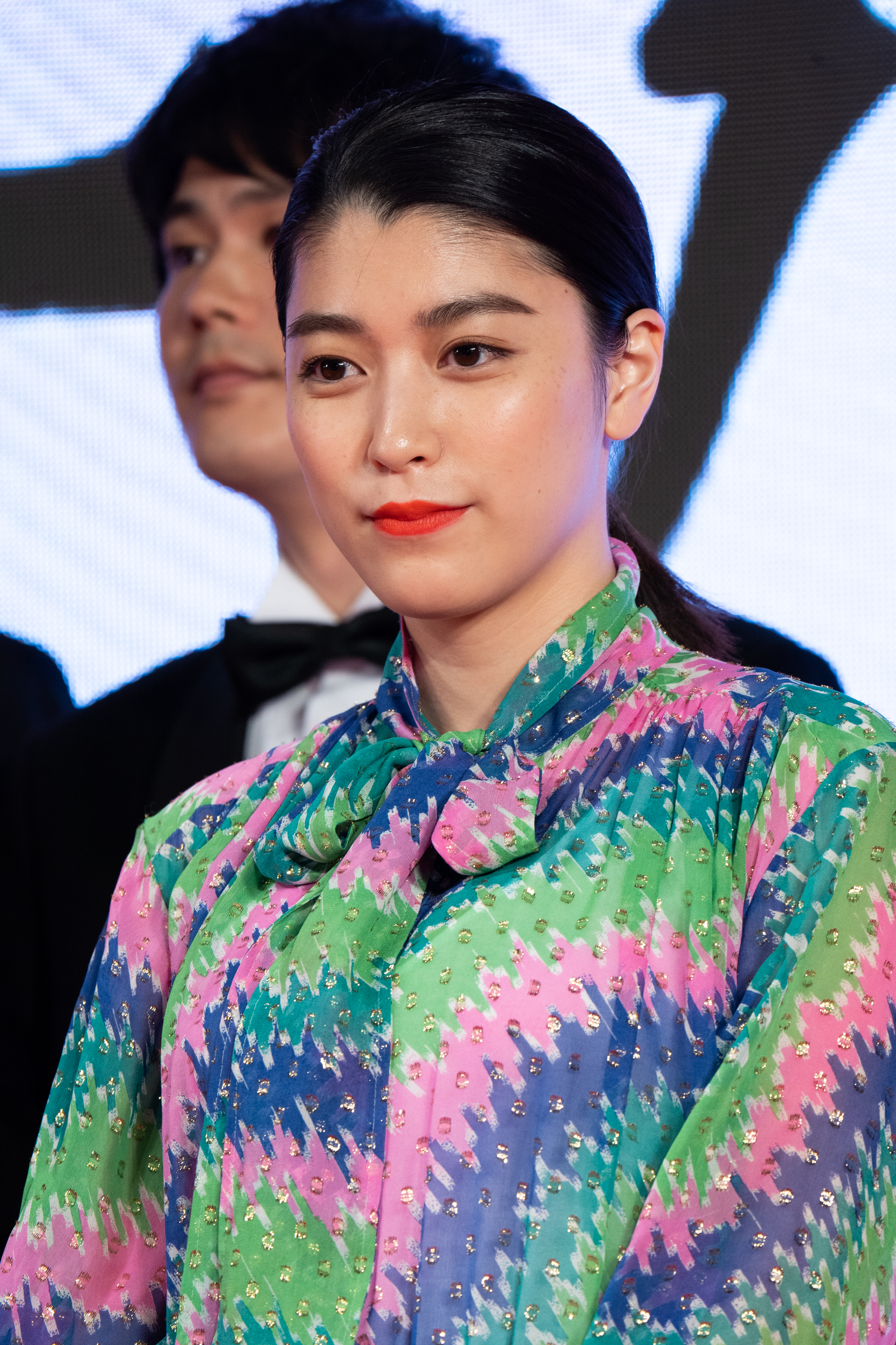 第32回 東京国際映画祭 オープニングセレモニー 成海璃子 (海辺の映画館―キネマの玉手箱)